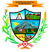 Escudo